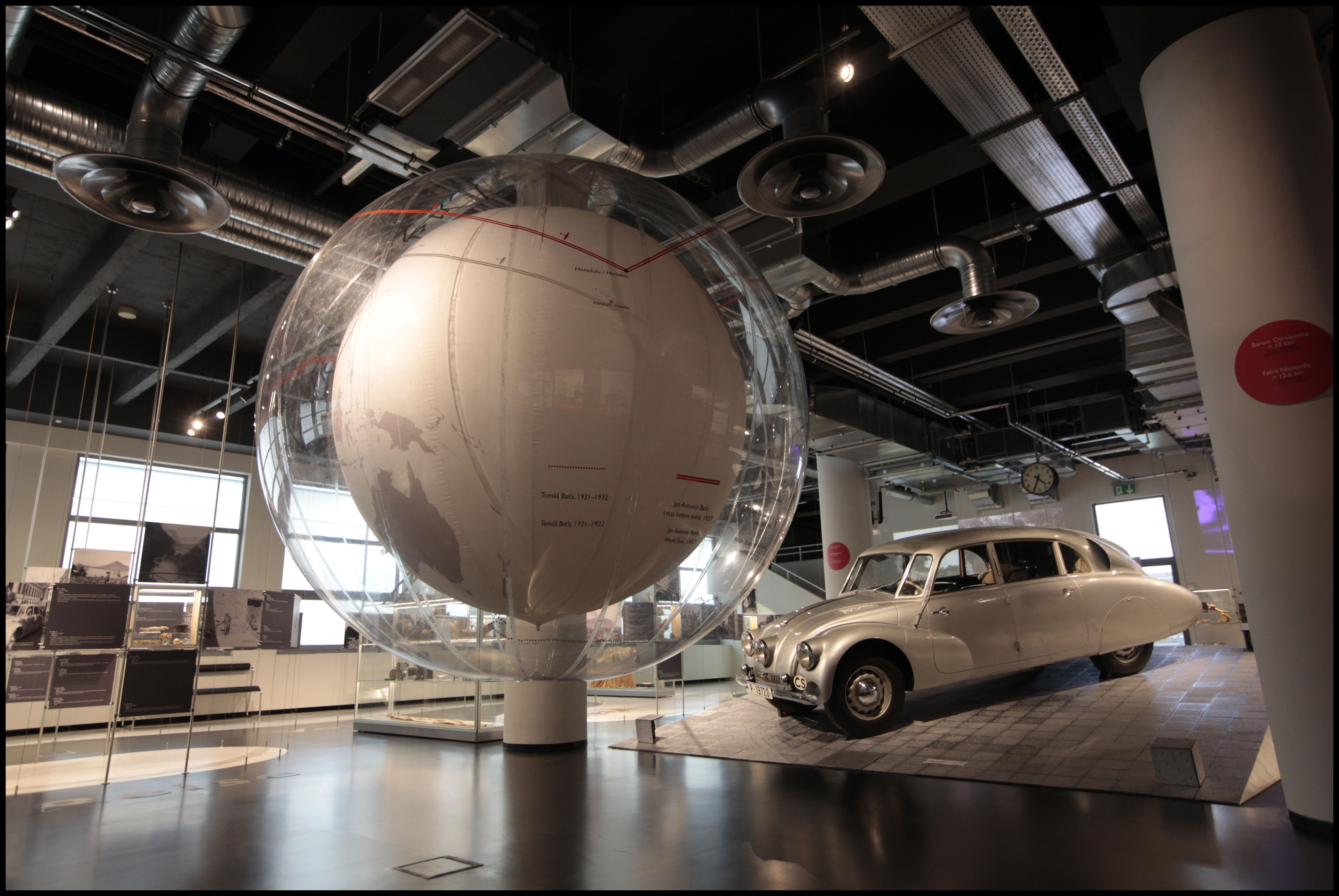 expozice Princip Baťa